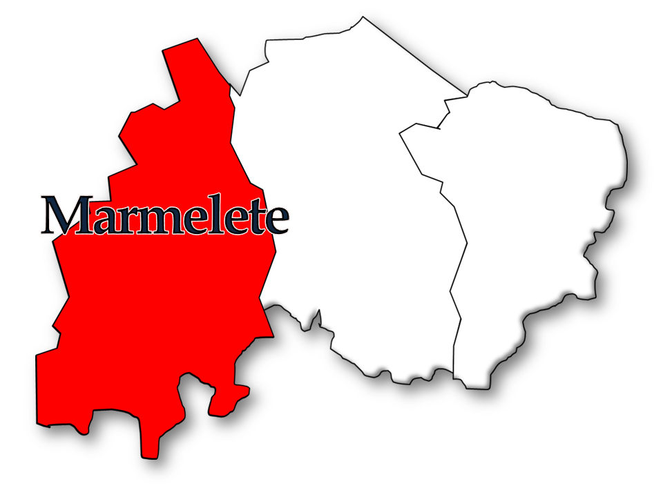 Censos 1864/2011